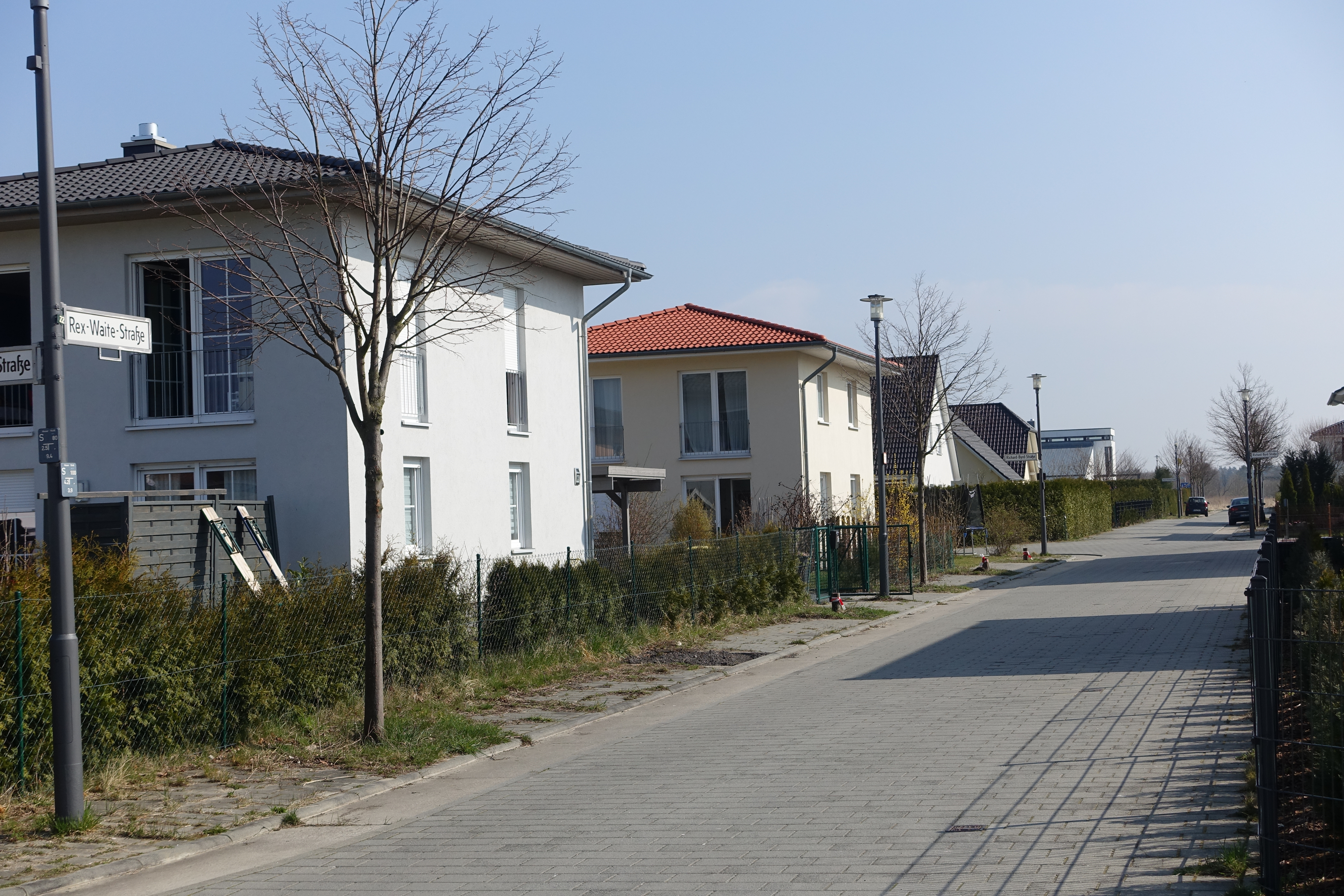 Straßenpanorama